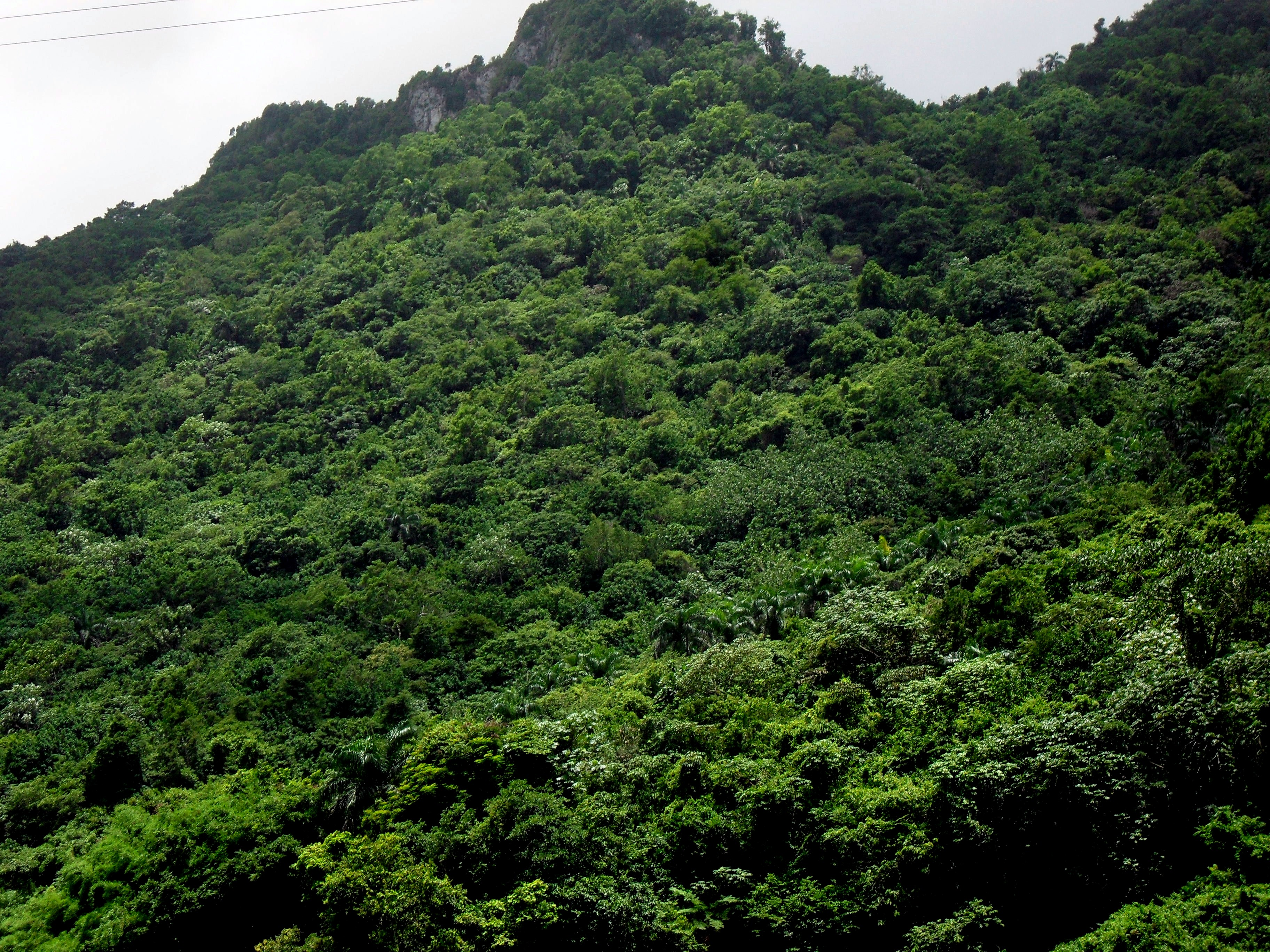 Utuado, Puerto Rico